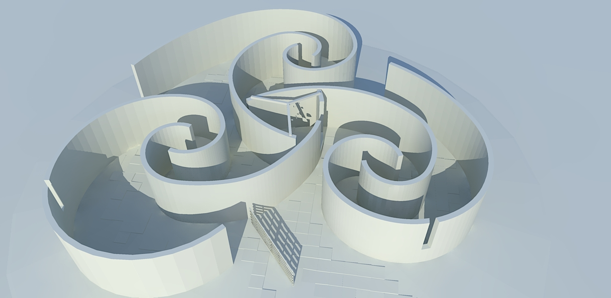 Vista del modello 3D del Labirinto dei ragazzi realizzato dagli architetti Lodovico Barbiano di Belgiojoso, Enrico Peressutti ed Ernesto Nathan Rogers, collocato nel Parco realizzato per la X edizione della Triennale di Milano